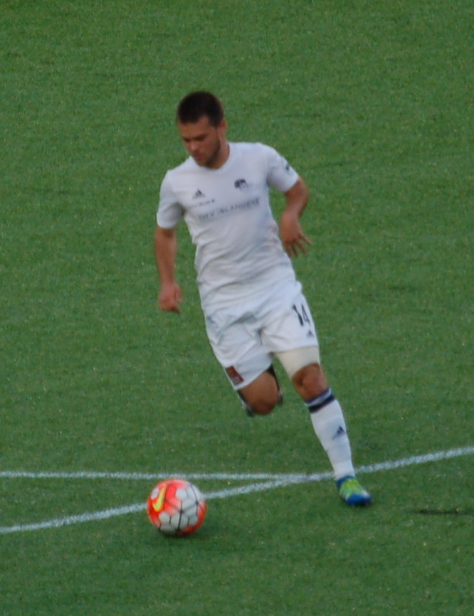 Danny DiPrima (Harrisburg)